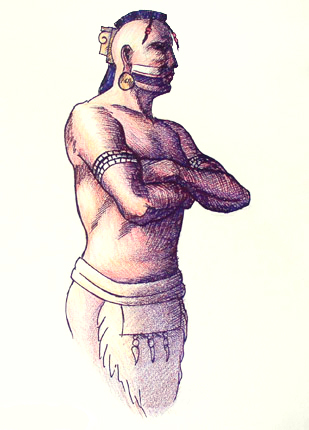 Chief Tuskaloosa-A mississippian chieftain in 1540's Alabama.